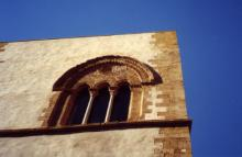 Foto personale